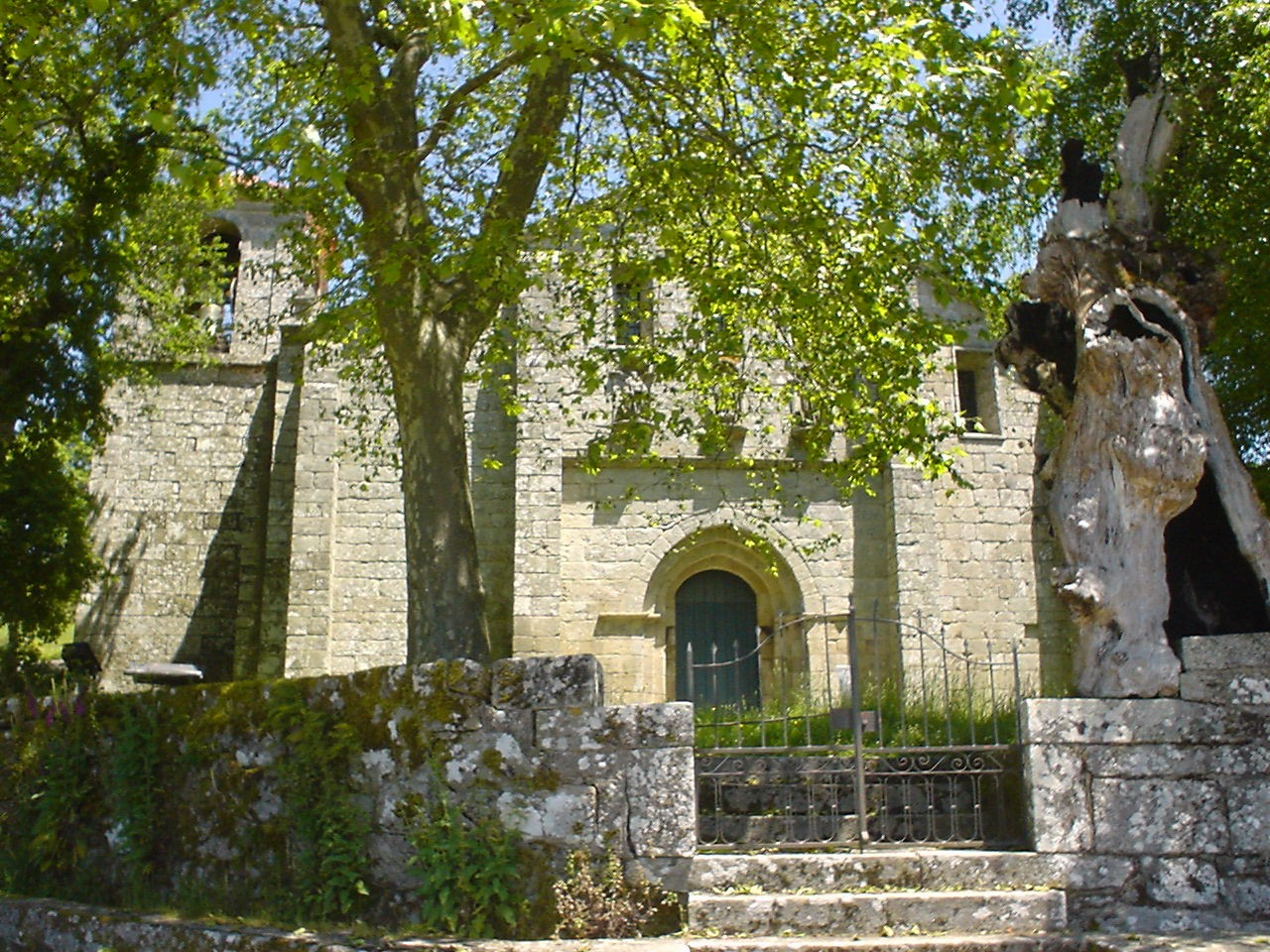 Floster Fiaes, Portugal, Ansicht von Westen